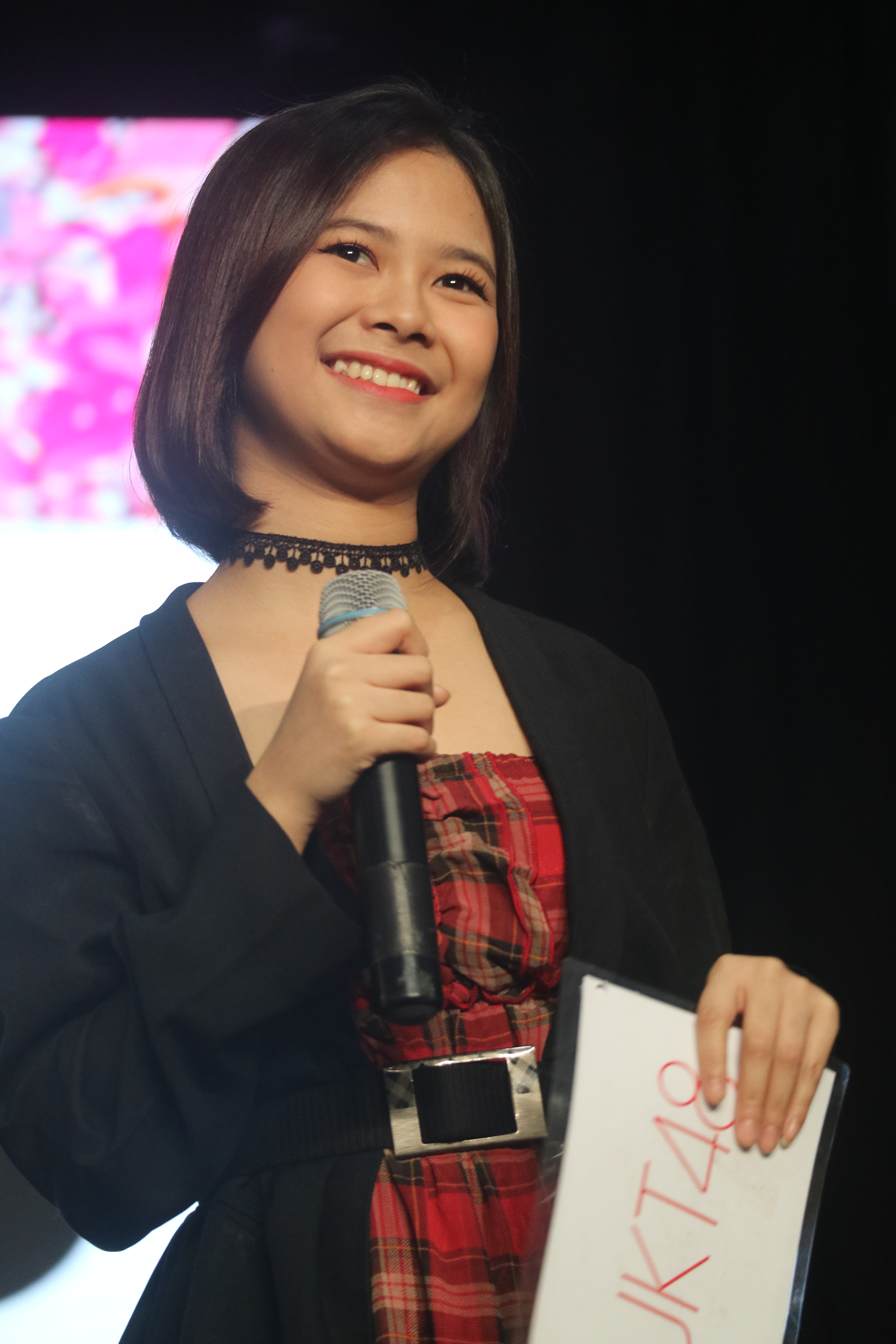 Fia at JOY KICK TEARS Surabaya